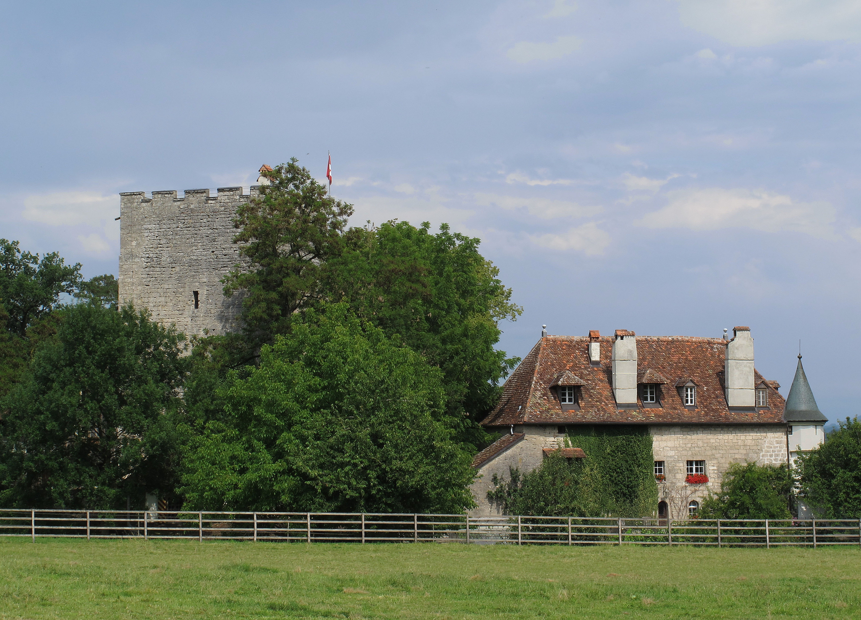 Schloss Klein-Vivers